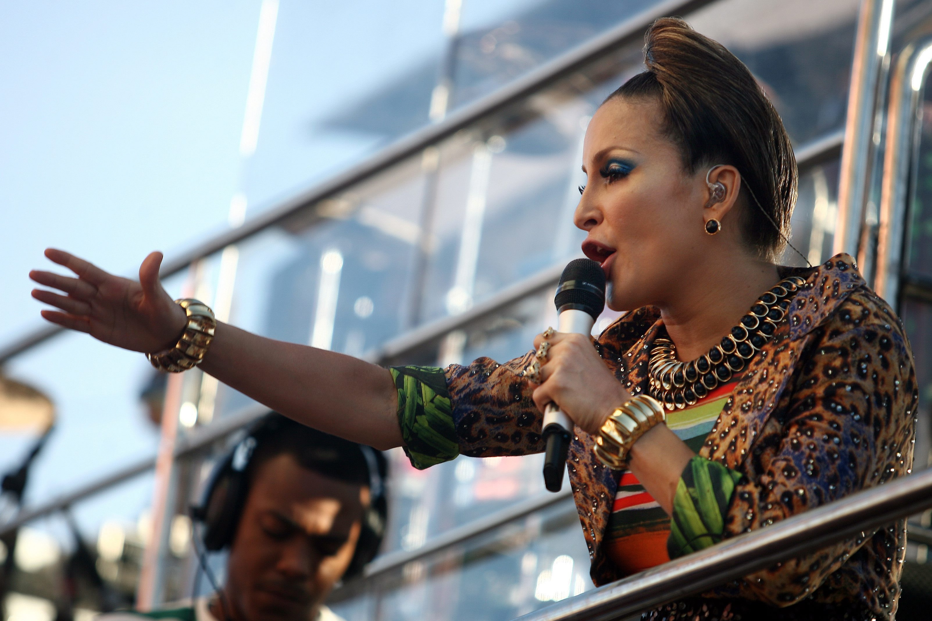 Bloco O Papa com Cláudia Leitte no Circuito Osmar em (21.02). Foto: Tatiana Azeviche - Setur